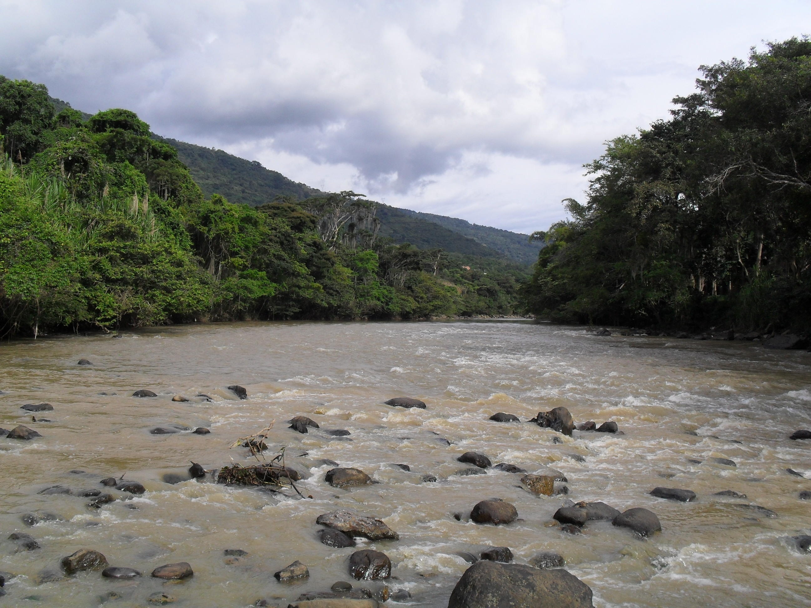 Río Fonce en San Gil, Santander, Colombia